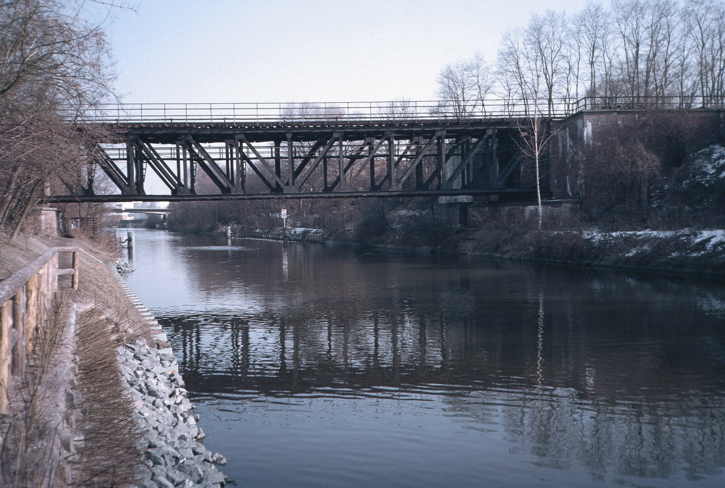 Berlin Anhalter Bahn / Brücke über den Teltowkanal